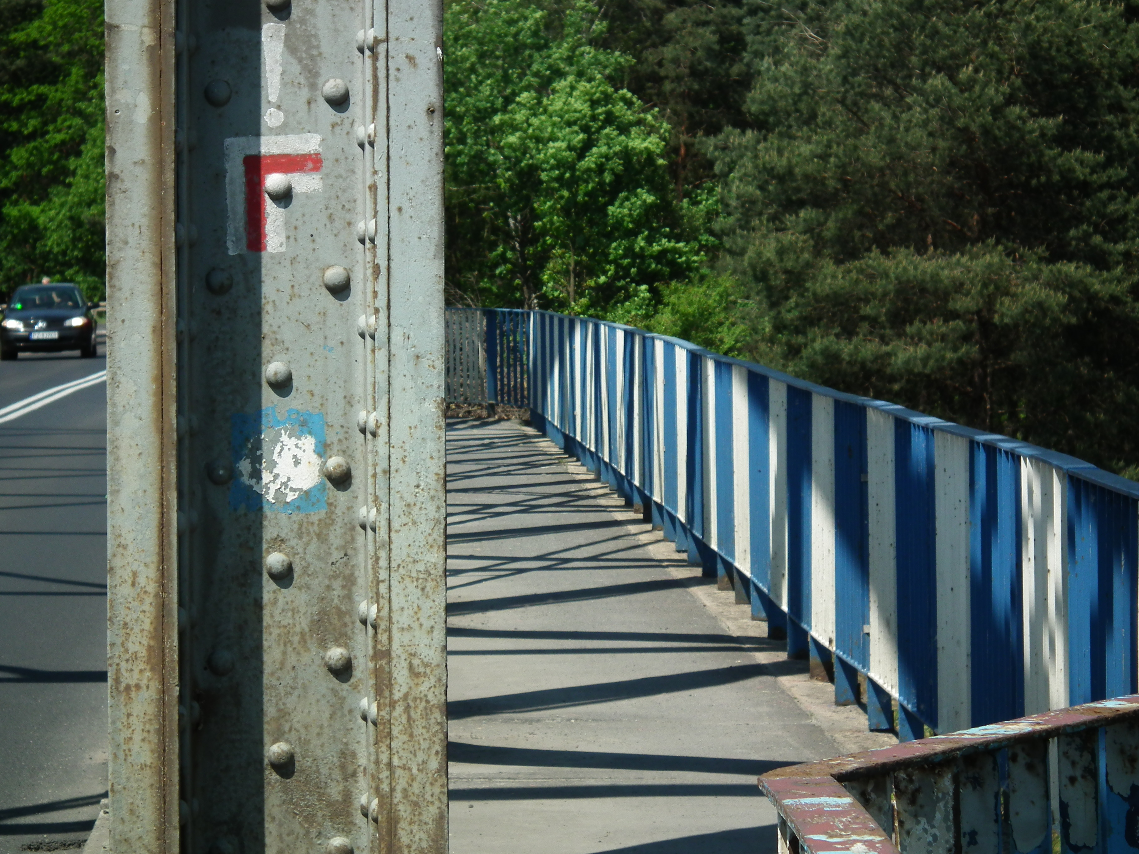 Most na Warcie w Rogalinku.